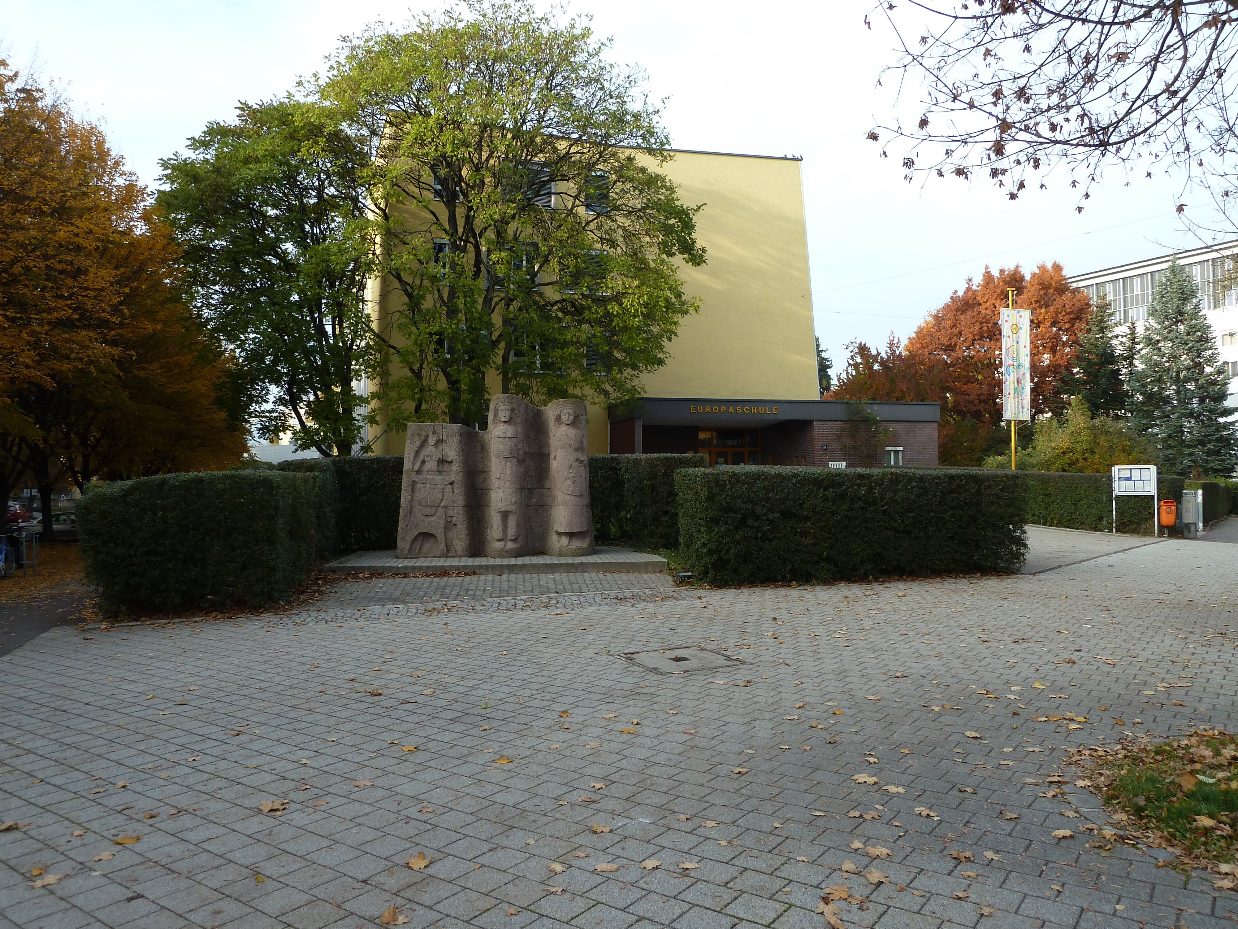 Europaschule mit Europadenkmal